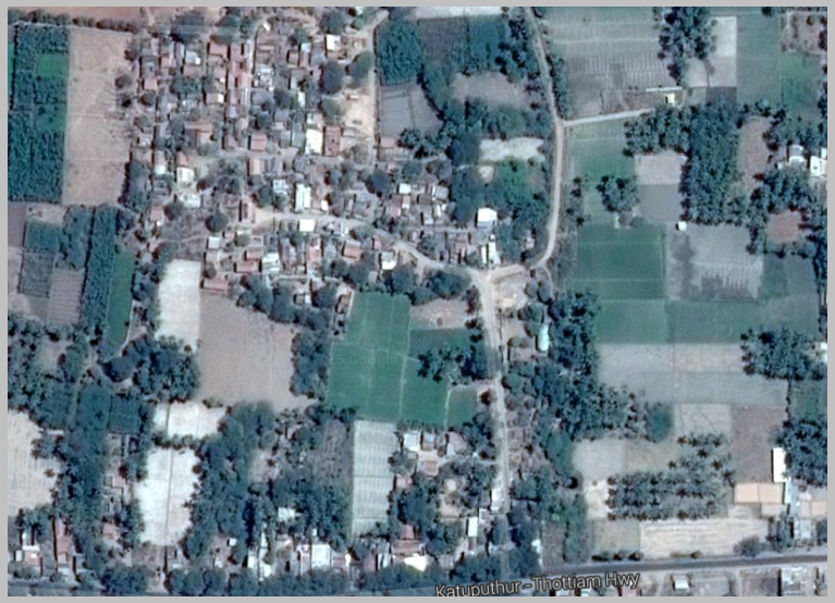 கார்த்திகைப்பட்டி-1